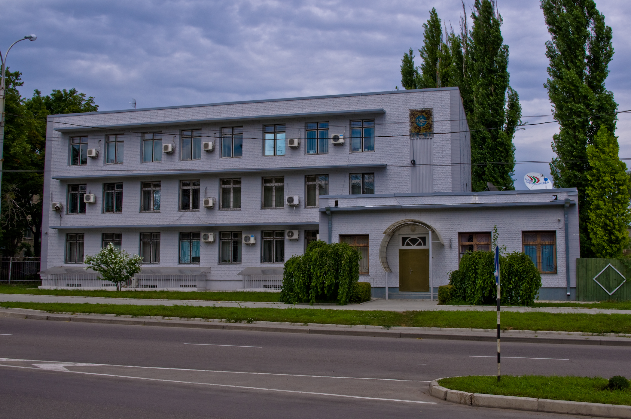 Новое здание "Радио Приднестровья". Сейчас в этом здании располагается Министерство регионального развития, транспорта и связи Приднестровской Молдавской Республики (старый сайт, новый сайт).